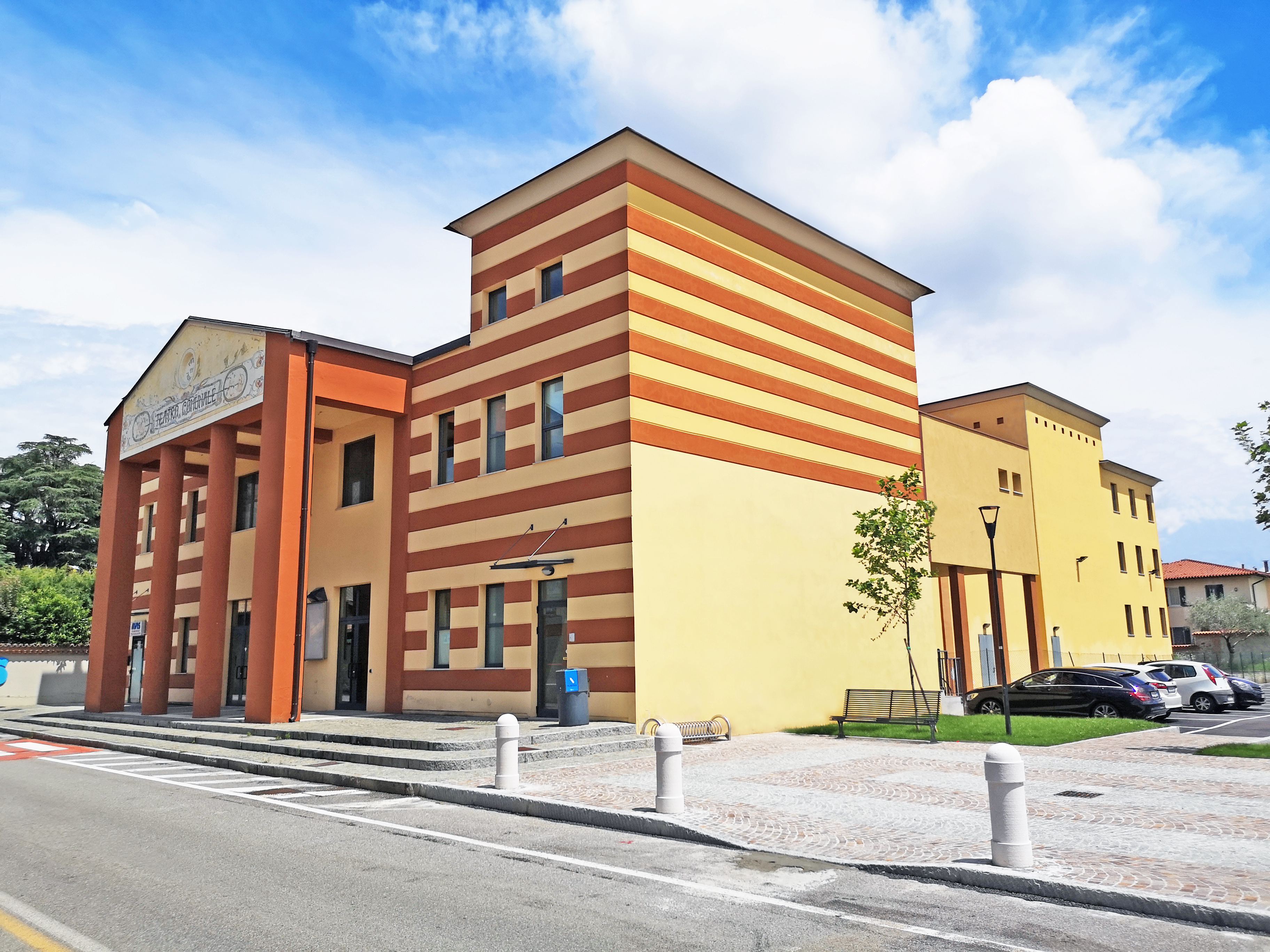 Il Teatro comunale Pietro Micheletti di Travagliato